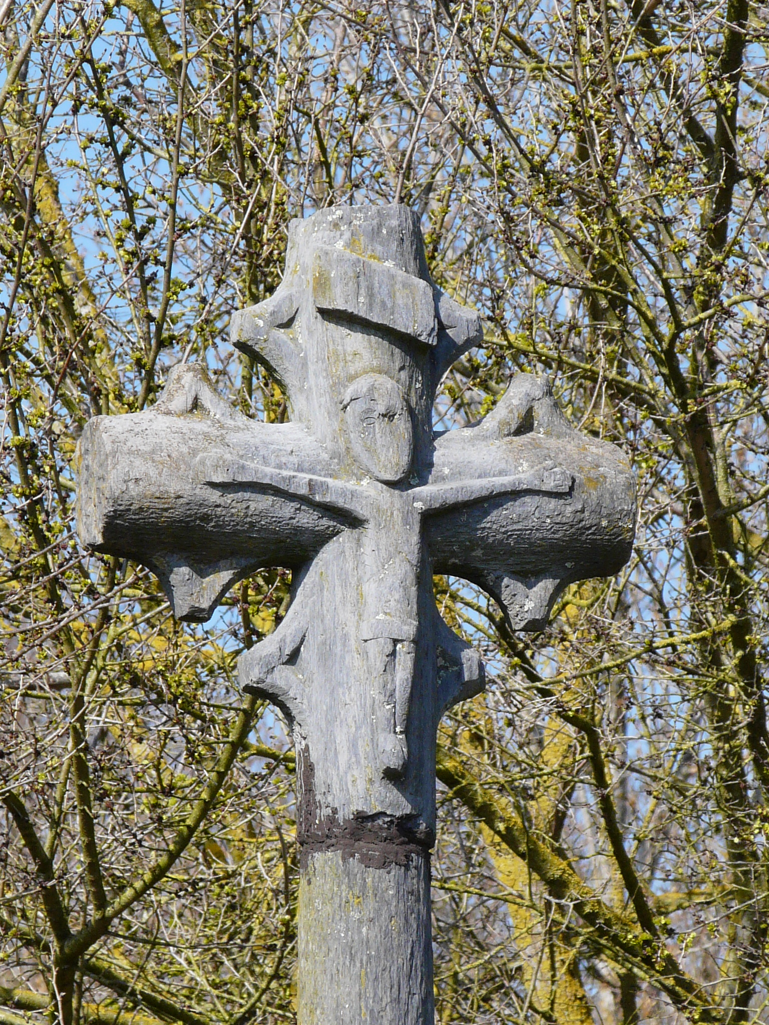 Croix en schiste sculpté